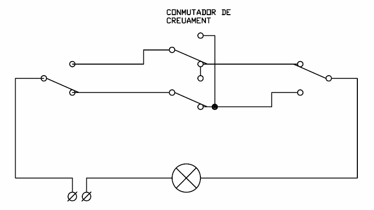 Circuit conmutador creuament